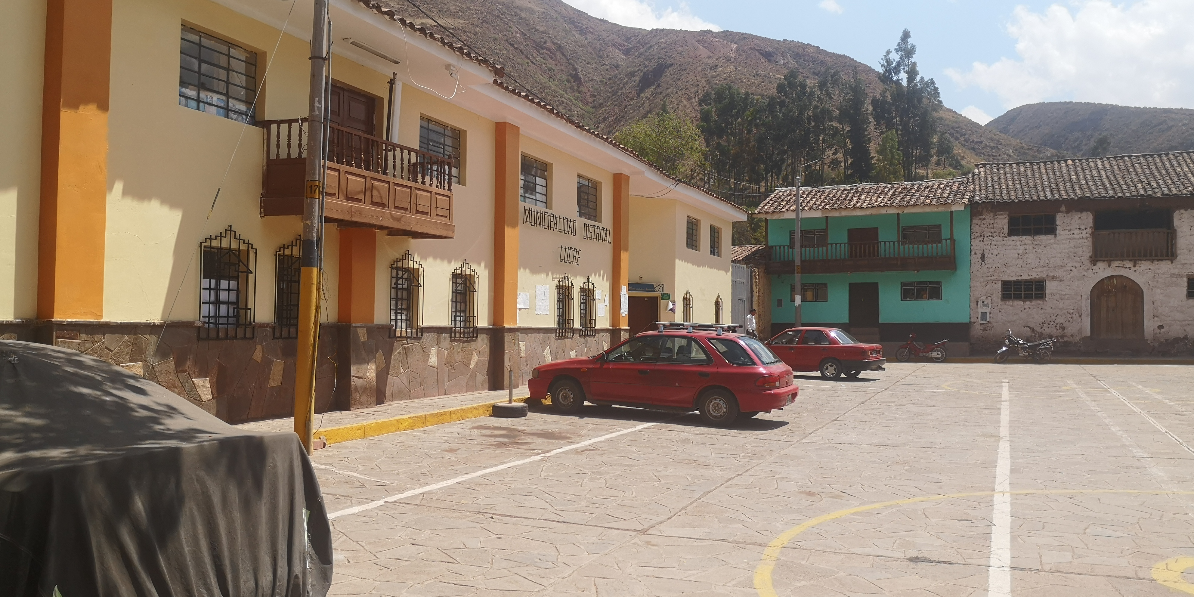 Local de la Municipalidad distrital de Lucre en la plaza de armas del pueblo de Lucre, provincia de Quispicanchi, departamento del Cusco, Perú.